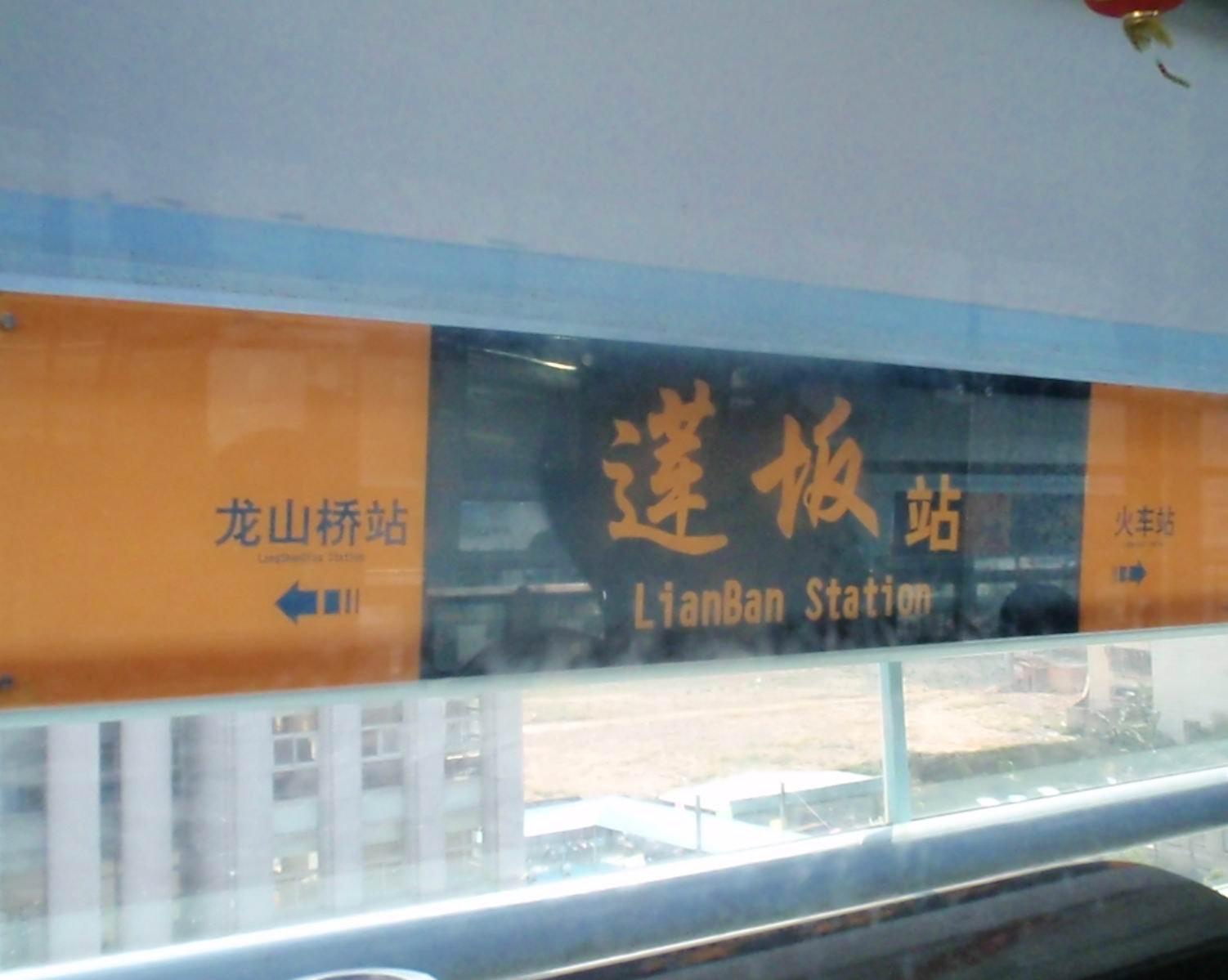 厦门快速公交莲坂站